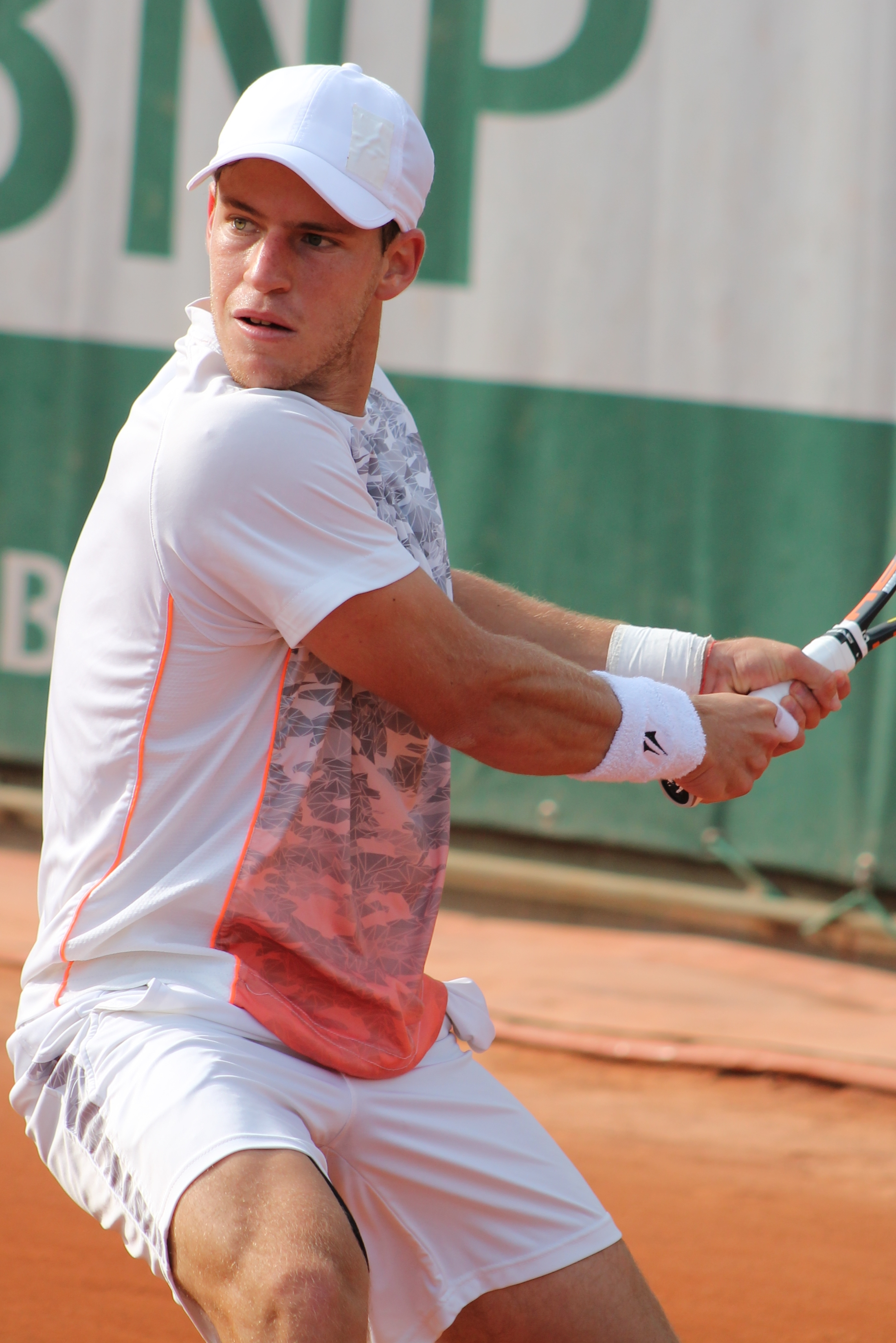 Schwartzman RG15 (21)